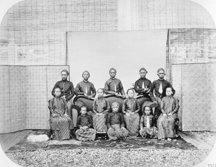 Foto. Groepsportret van de regent van Koedoes, Tjondro Negoro, met zijn familie